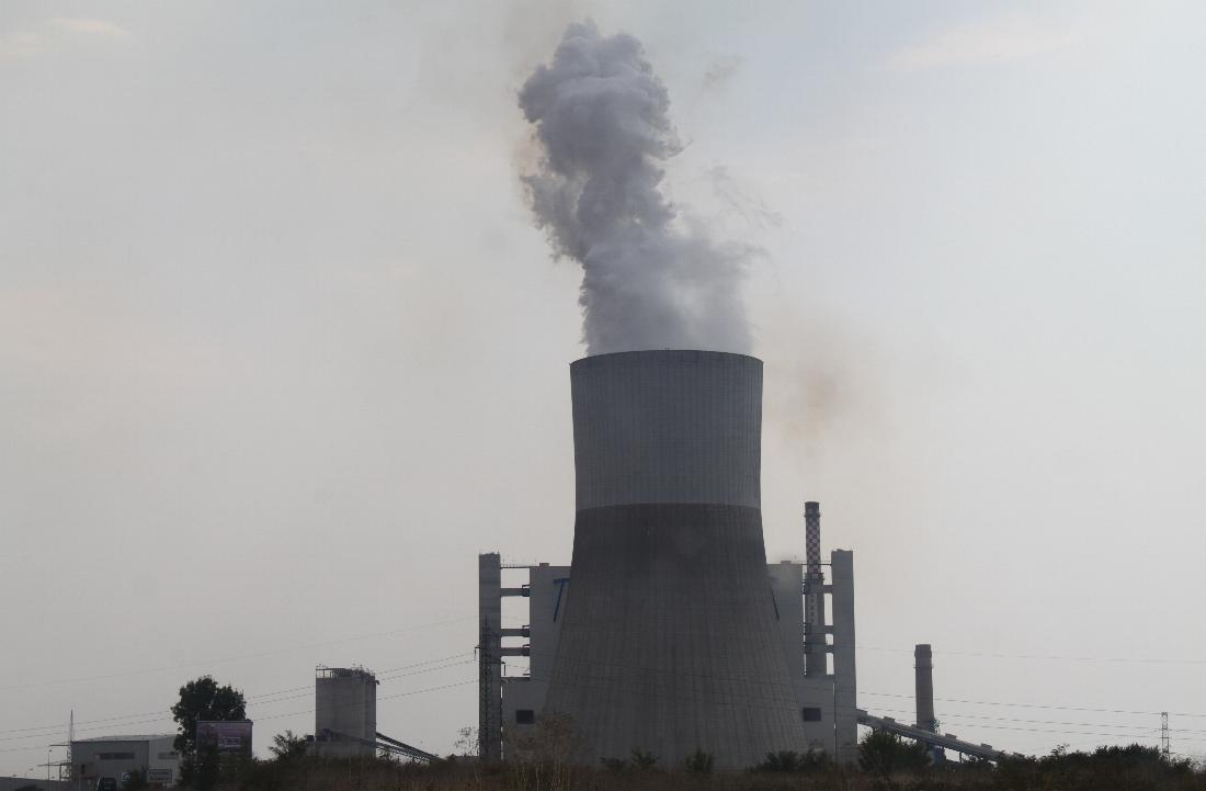 Kraftwerk Galabovo, Süd Bulgarien Maritsa Iztok Complex